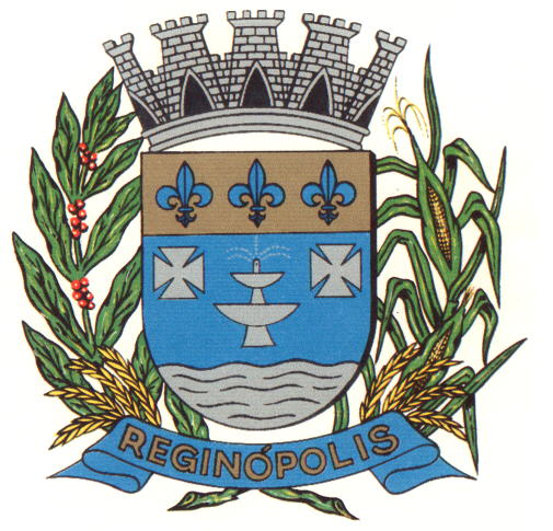 Bandeira do município de Reginópolis - SP - Brasil.